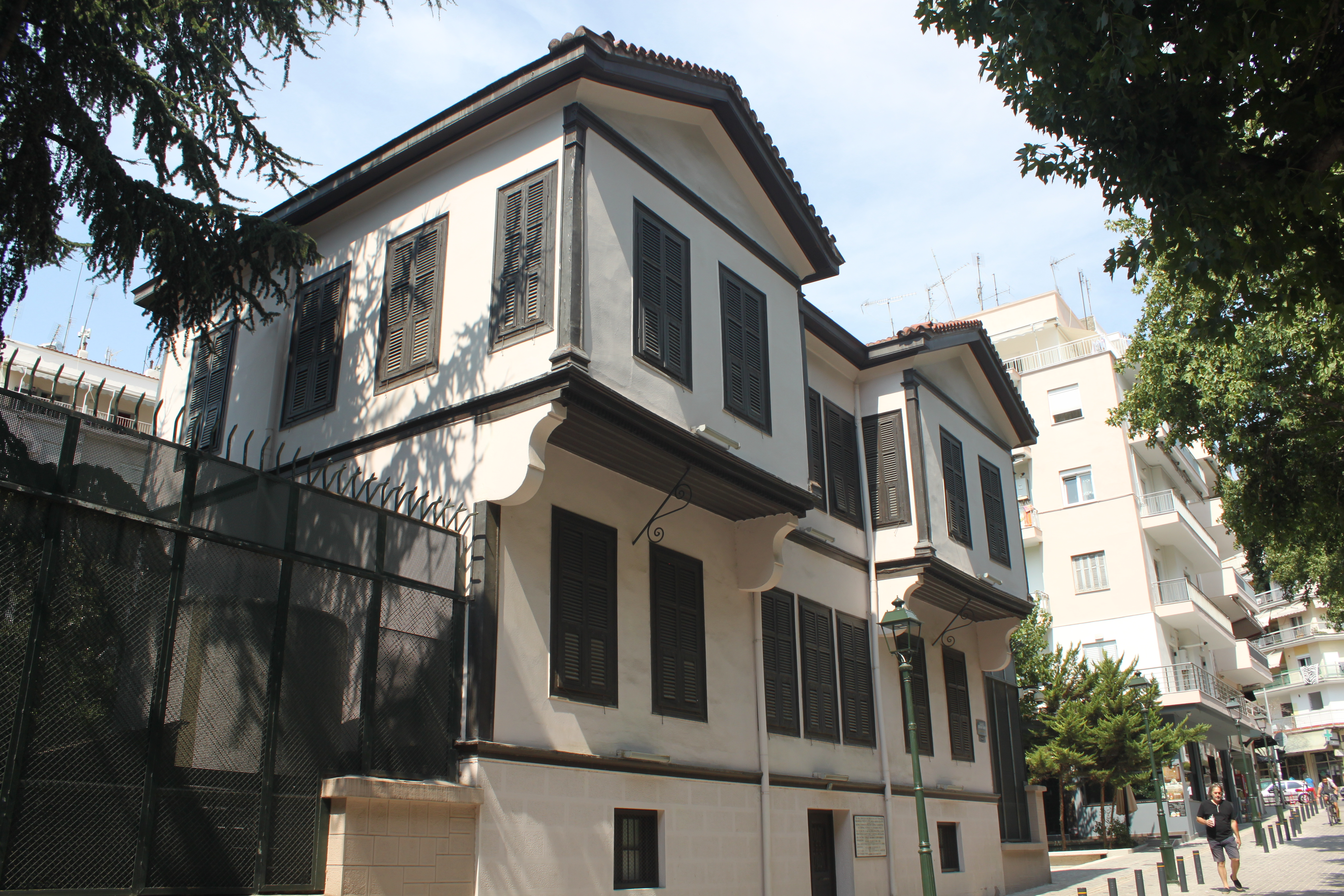 Maison natale de Mustafa Kemal Atatürk, rue Apostolou Pavlou, aujourd'hui musée Atatürk de Thessalonique